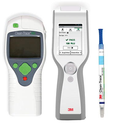 Clean-Trace ATP-mätare används för snabba hygienkontroller.